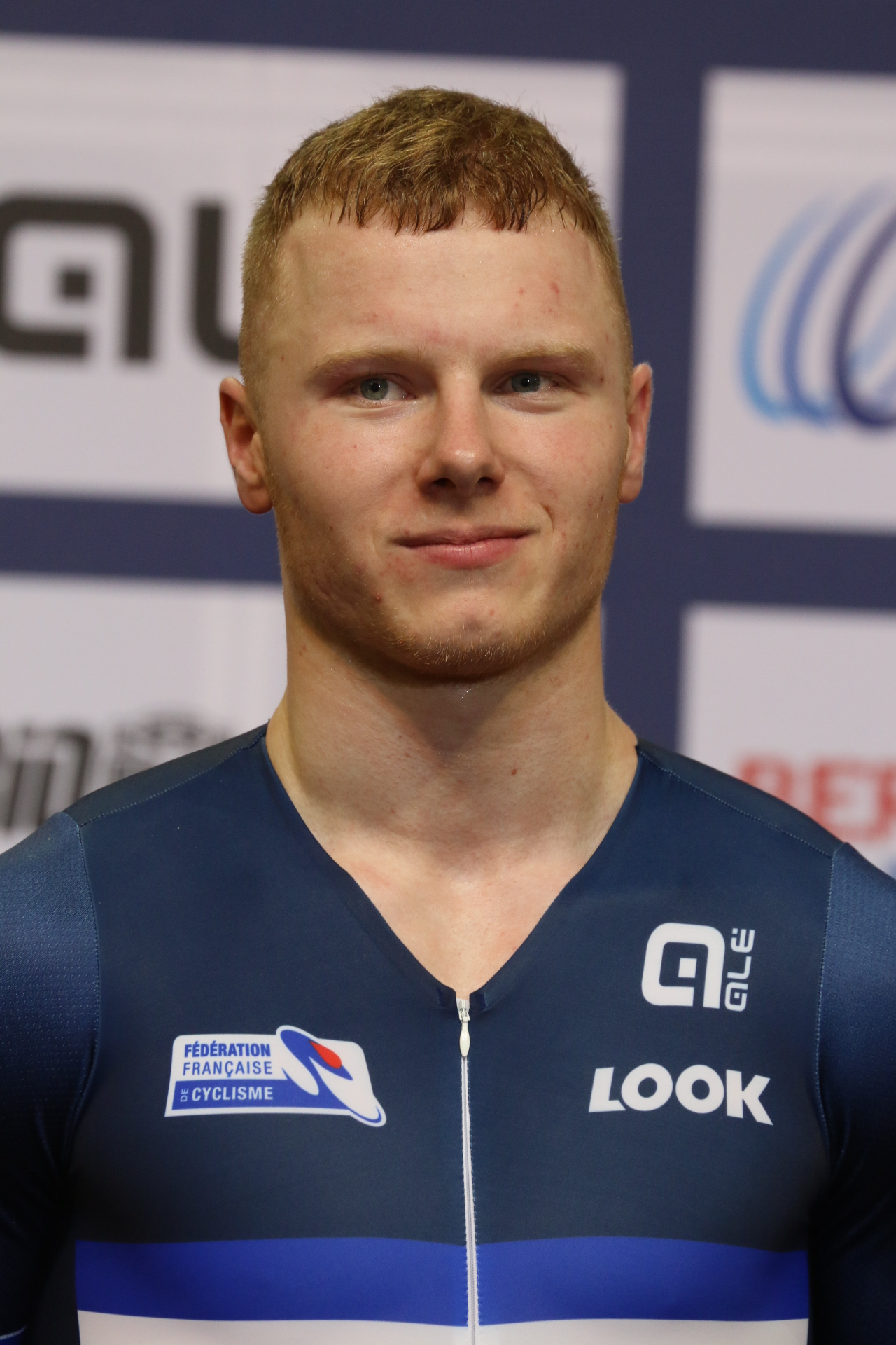 Sébastien Vigier, französischer Radsportler